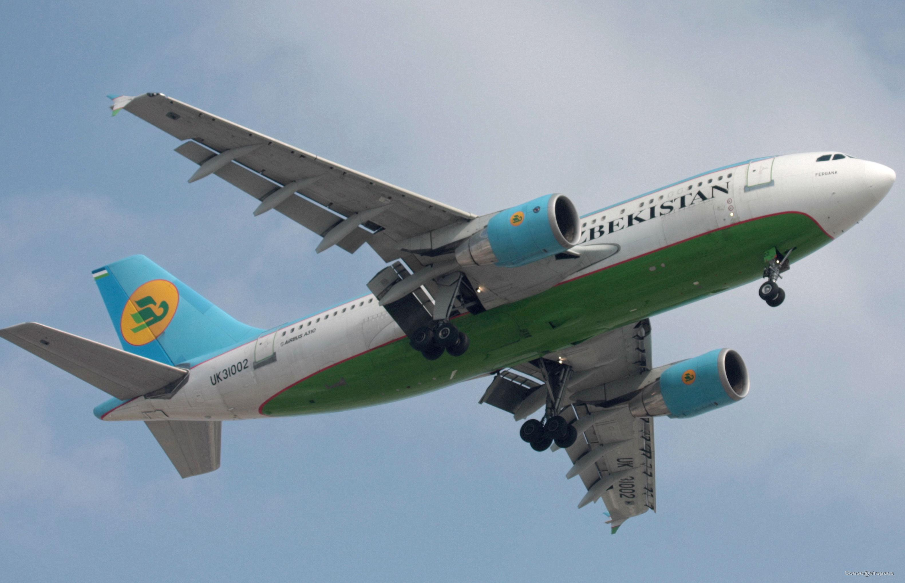 Самолет взлетает из аеропорта Дубаи